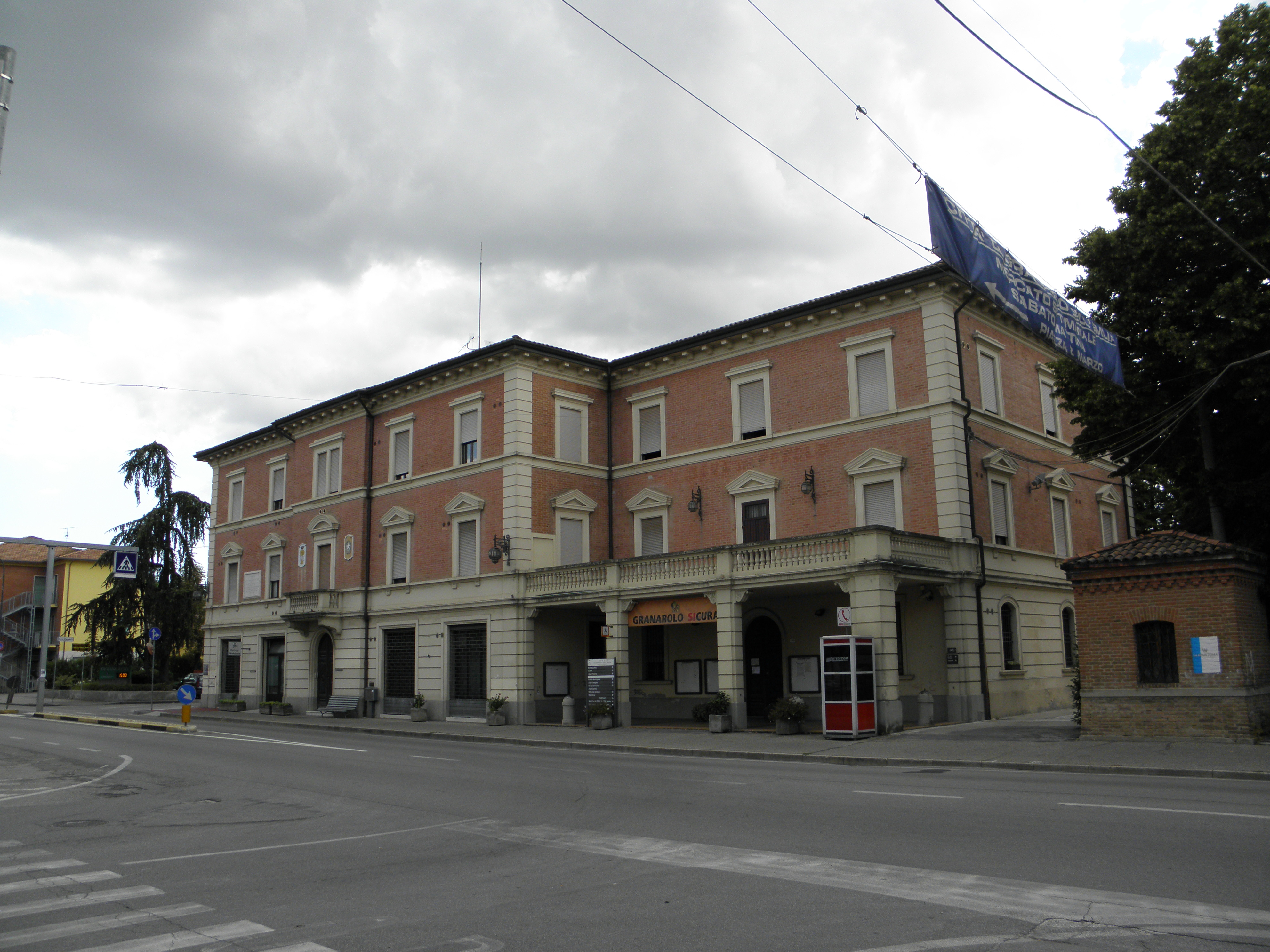 Granarolo dell'Emilia: il Palazzo Municipale.